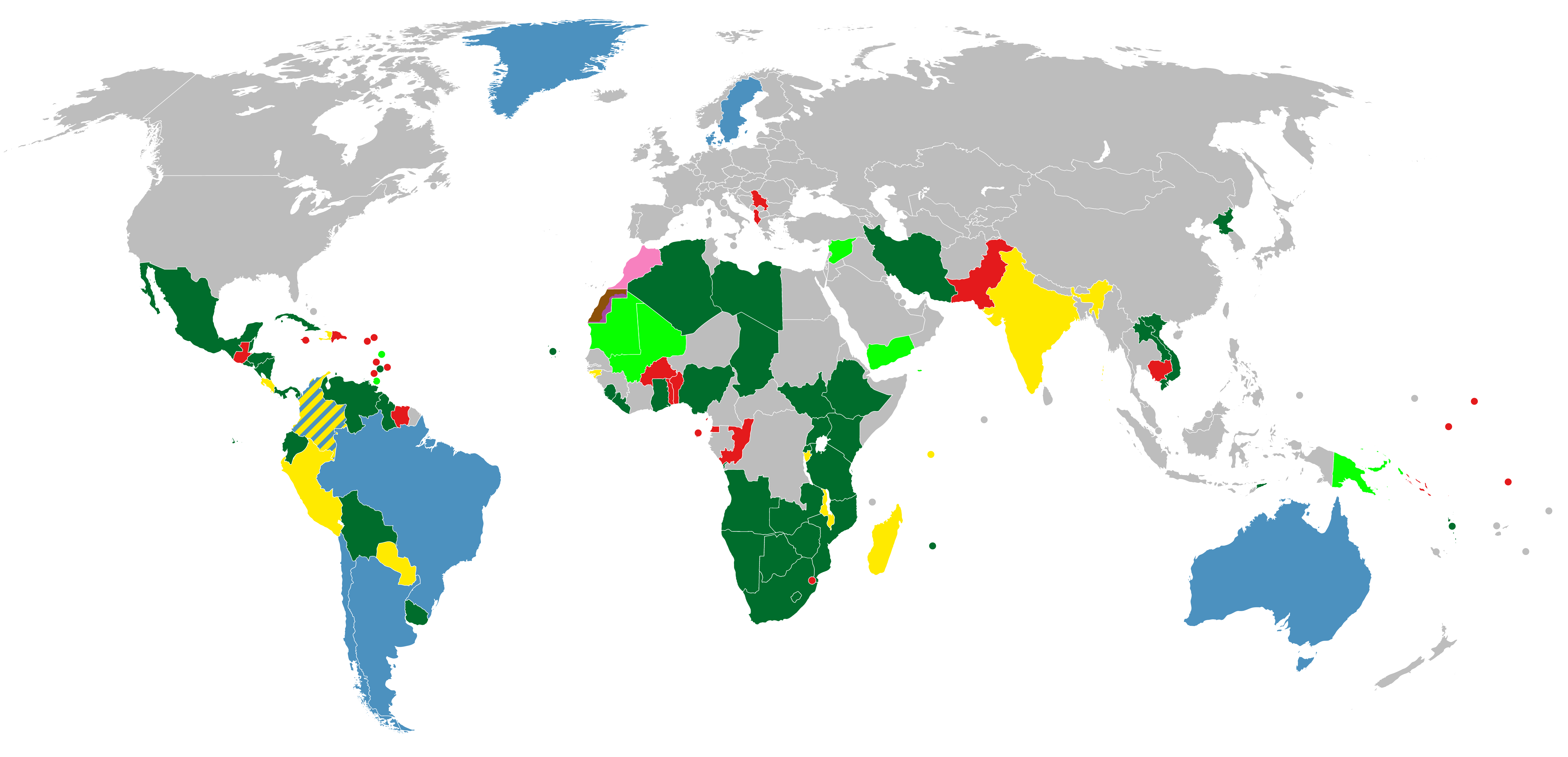 Международно-правовое признание САДР:Розовым - Марокко, коричневым и фиолетовым -Западная Сахара; тёмно-зелёным - государства, признающие независимость САДР и имеющие с ней дипломатические отношения; светло-зелёным - государство, только признающие САДР, не имеющие с ней дипломатические отношения; жёлтым - государства, заморозившие отношения с САДР; красным- государства, отменившие или отозвавшие свое признание САДР, голубым - государства, чьи парлементы проголосовали за признание САДР